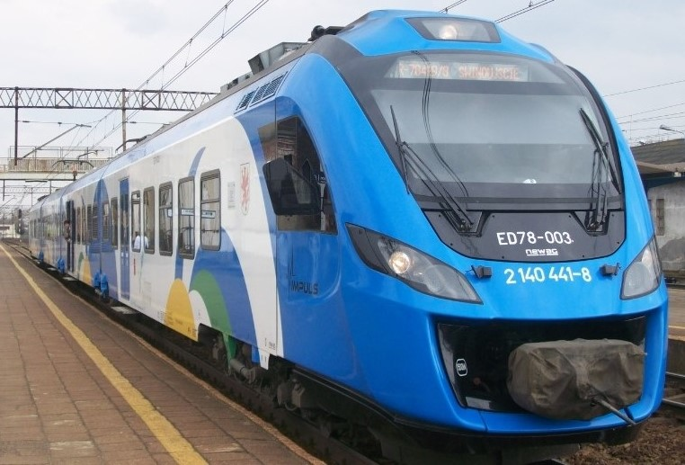 ED78-003 jako pociąg REGIO relacji Poznań Gł.-Świnoujście